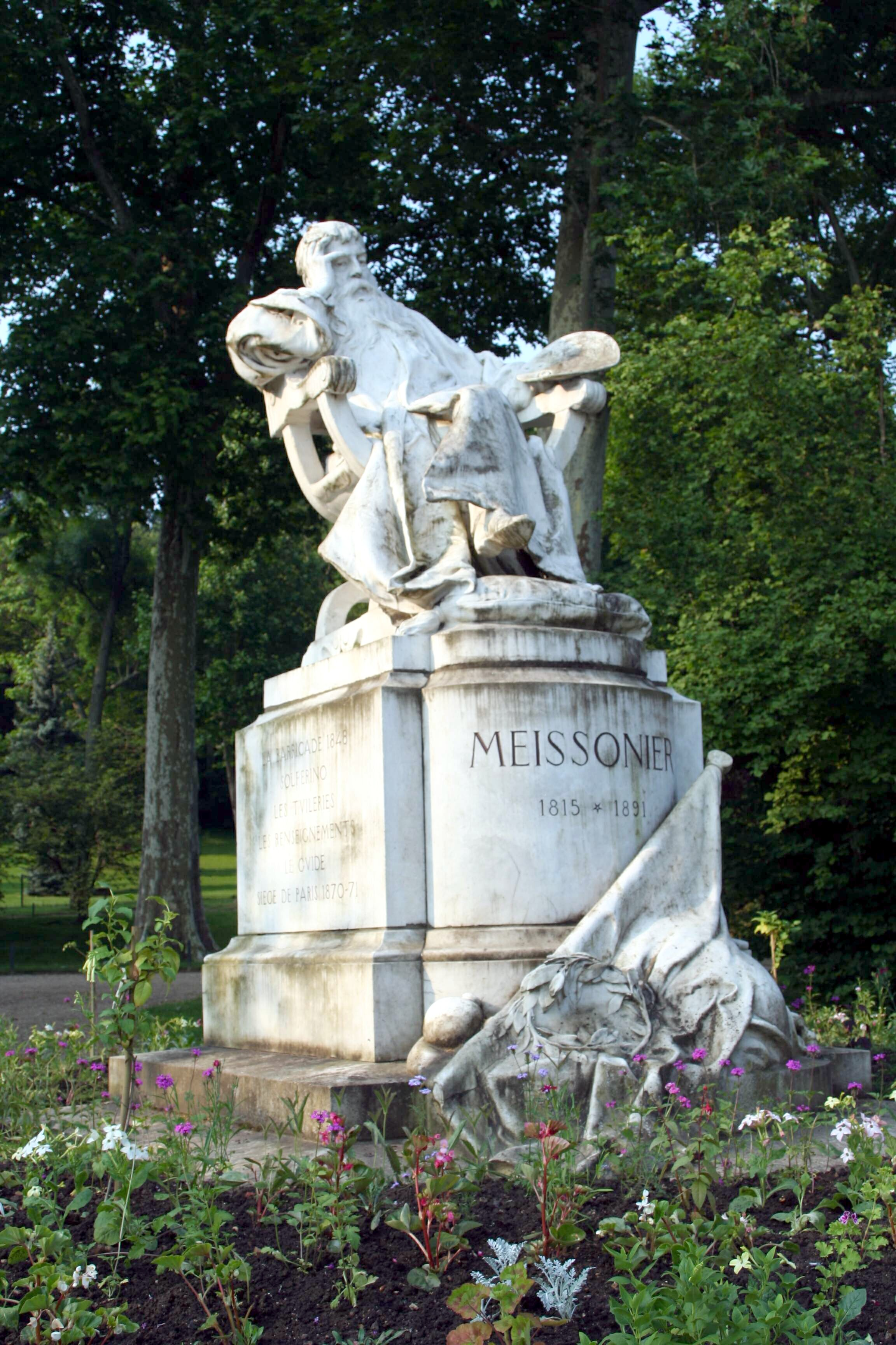 Statue d'Ernest Meissonier au parc Meissonier à Poissy - Yvelines (France)